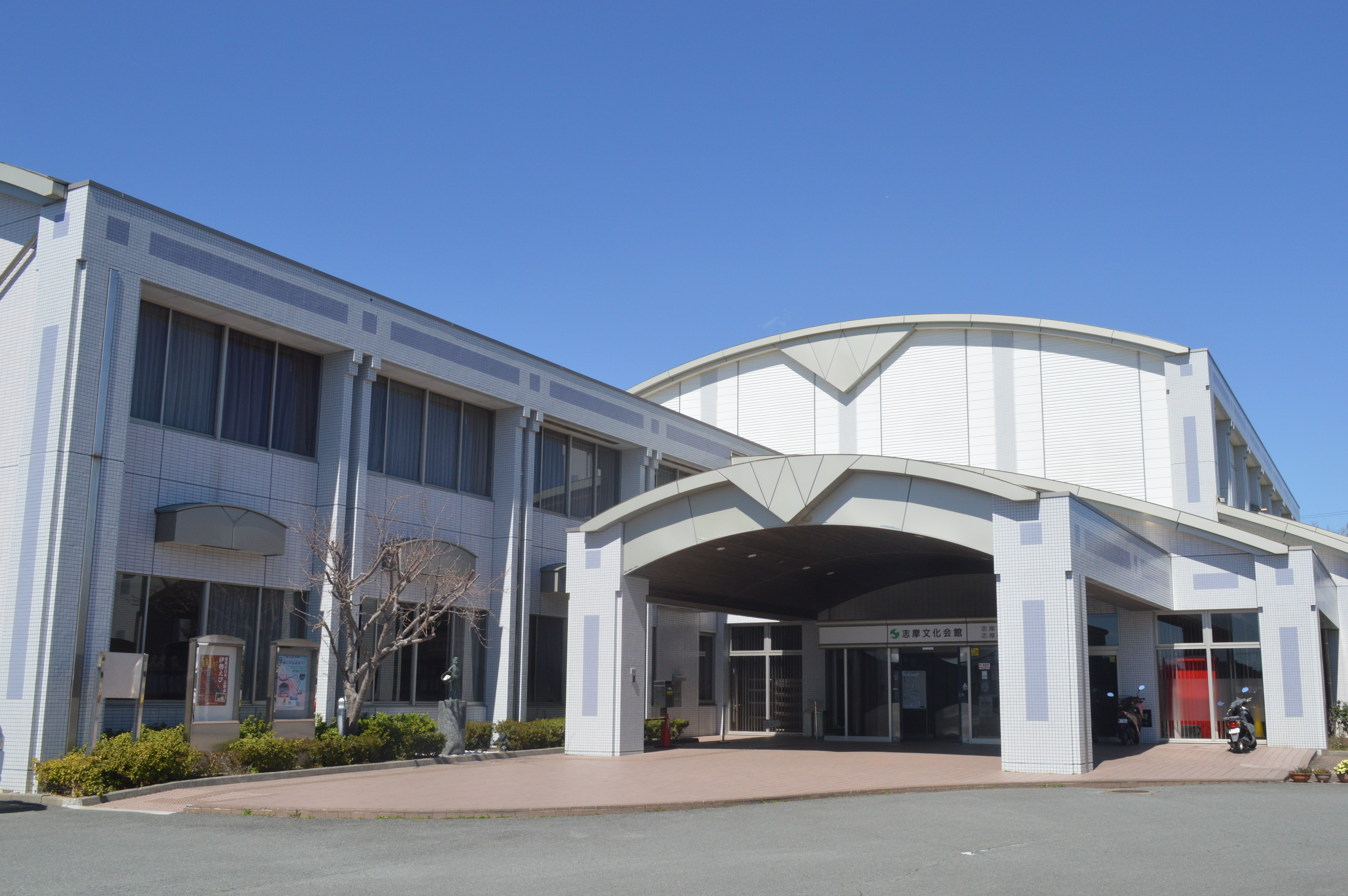 三重県志摩市志摩町和具にある志摩市志摩文化会館。